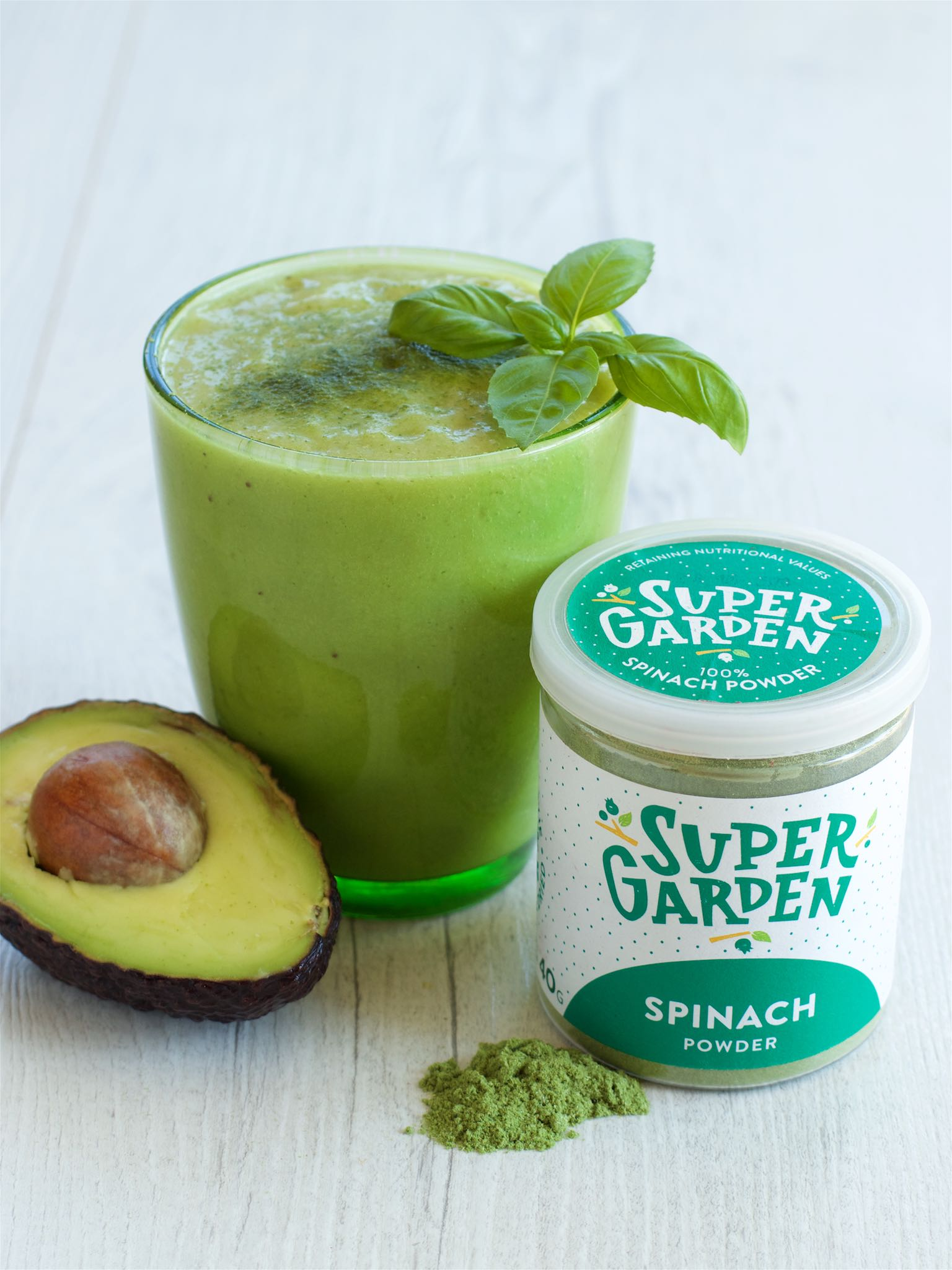 Džiovinti šaltyje milteliai ypač tinkami gaminant glotnučius, ledus ar kitus desertus, gardinant salotas ir košes.